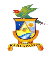 Escudo de Rahuapampa